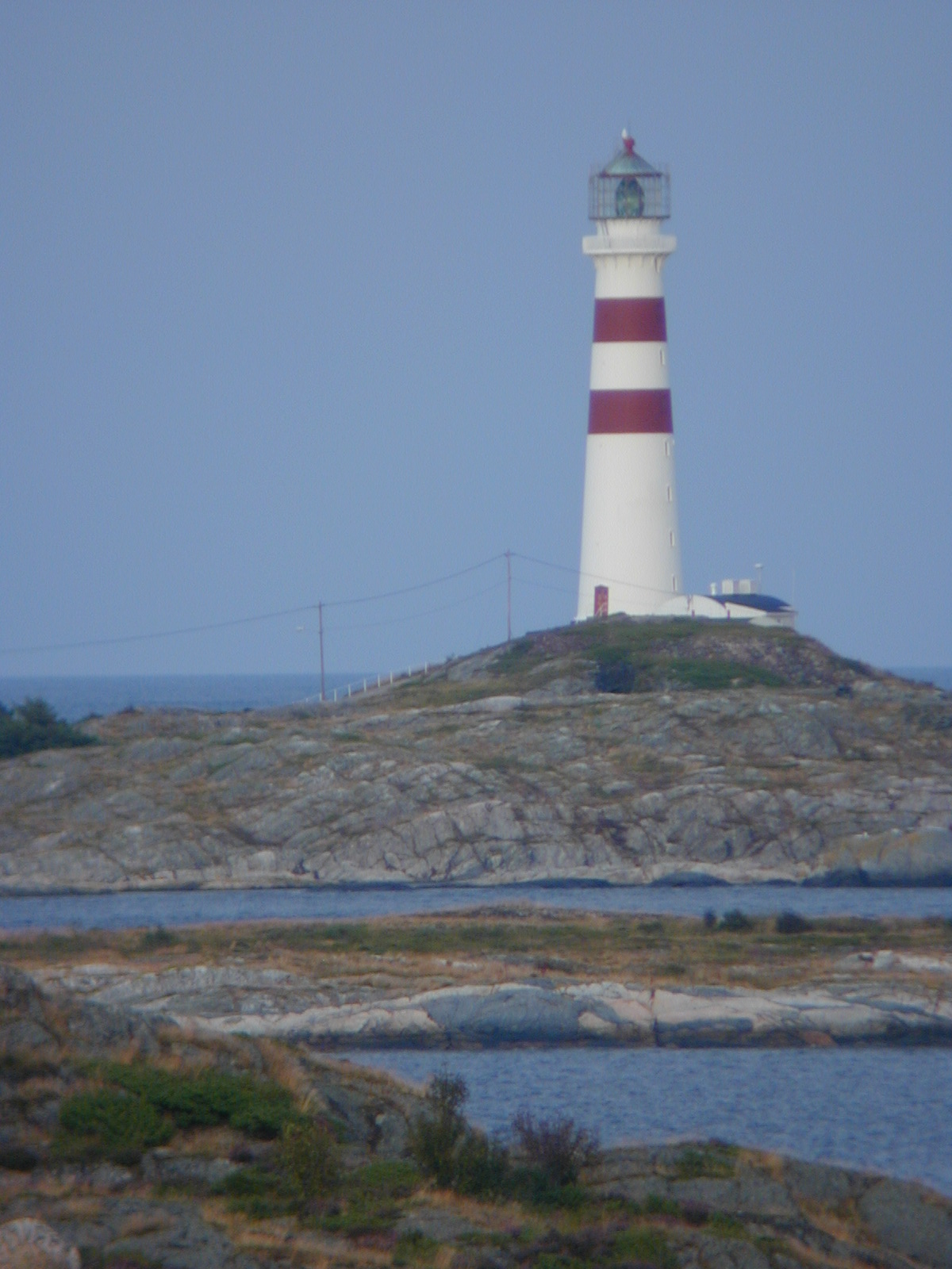 Oksøy fyrstasjon